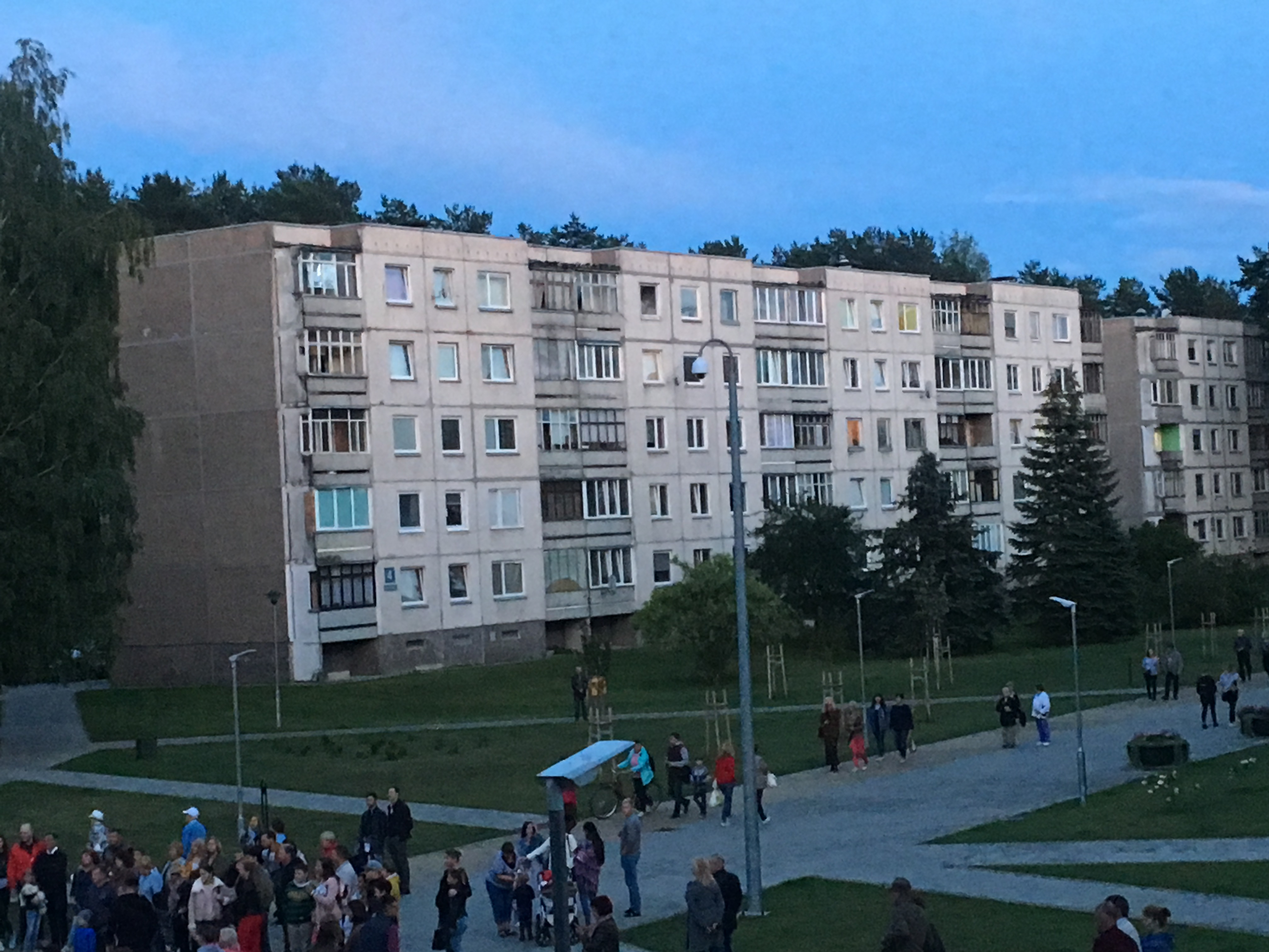 Дома около дороги в пляж Висагинас, 1 микрорайон.